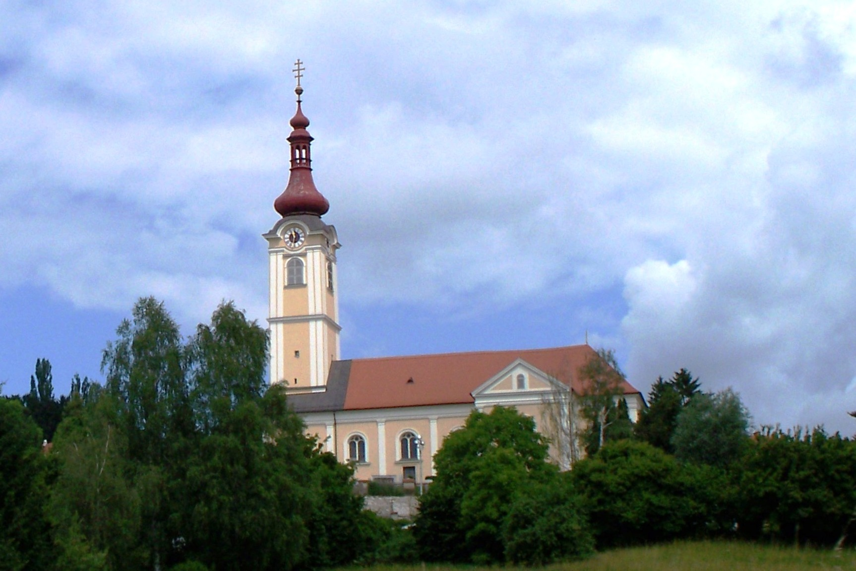 Graz St. Veit (2010).